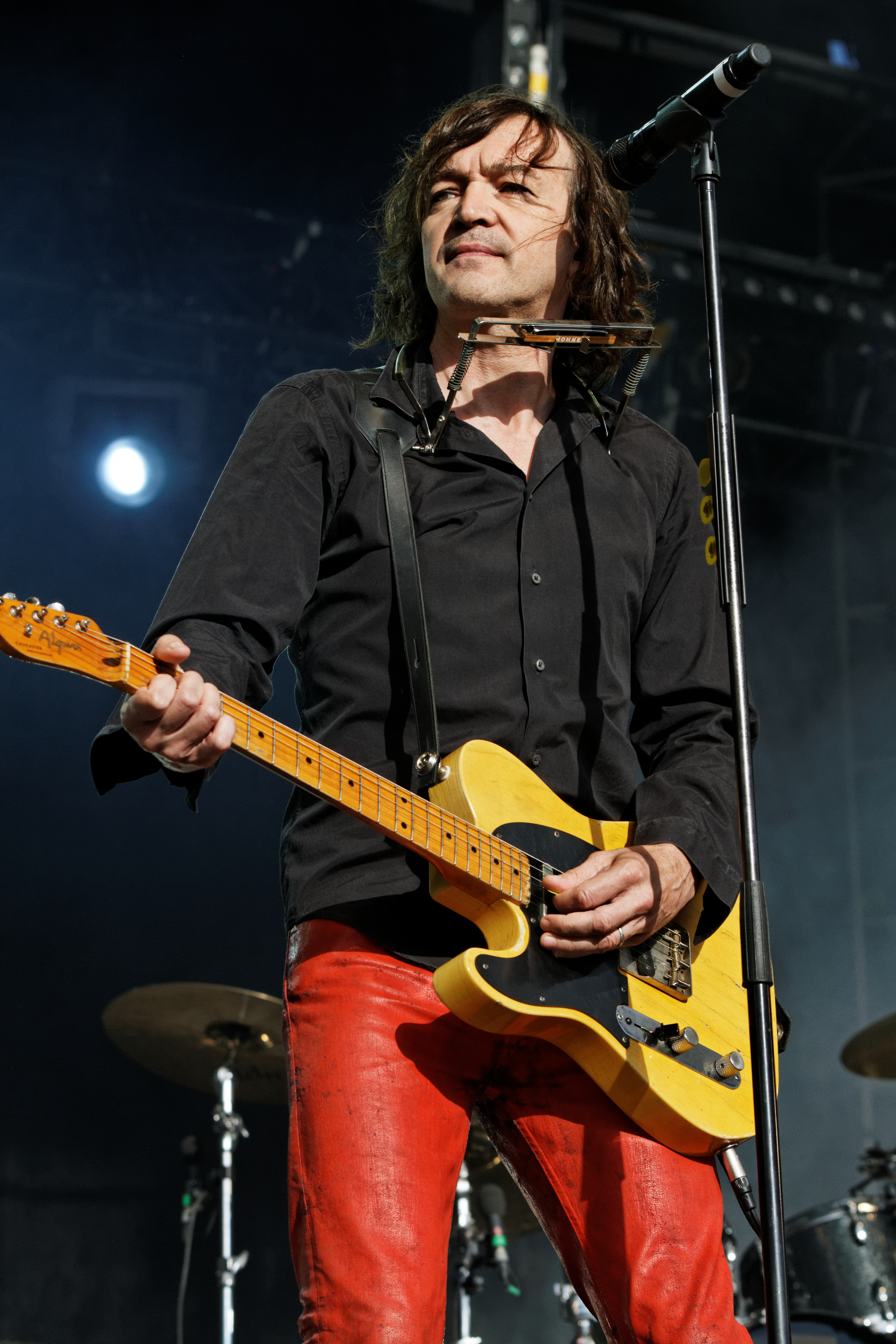 Cali en concert sur la scène Landaoudec lors du festival du bout du Monde à Crozon dans le Finistère (France).